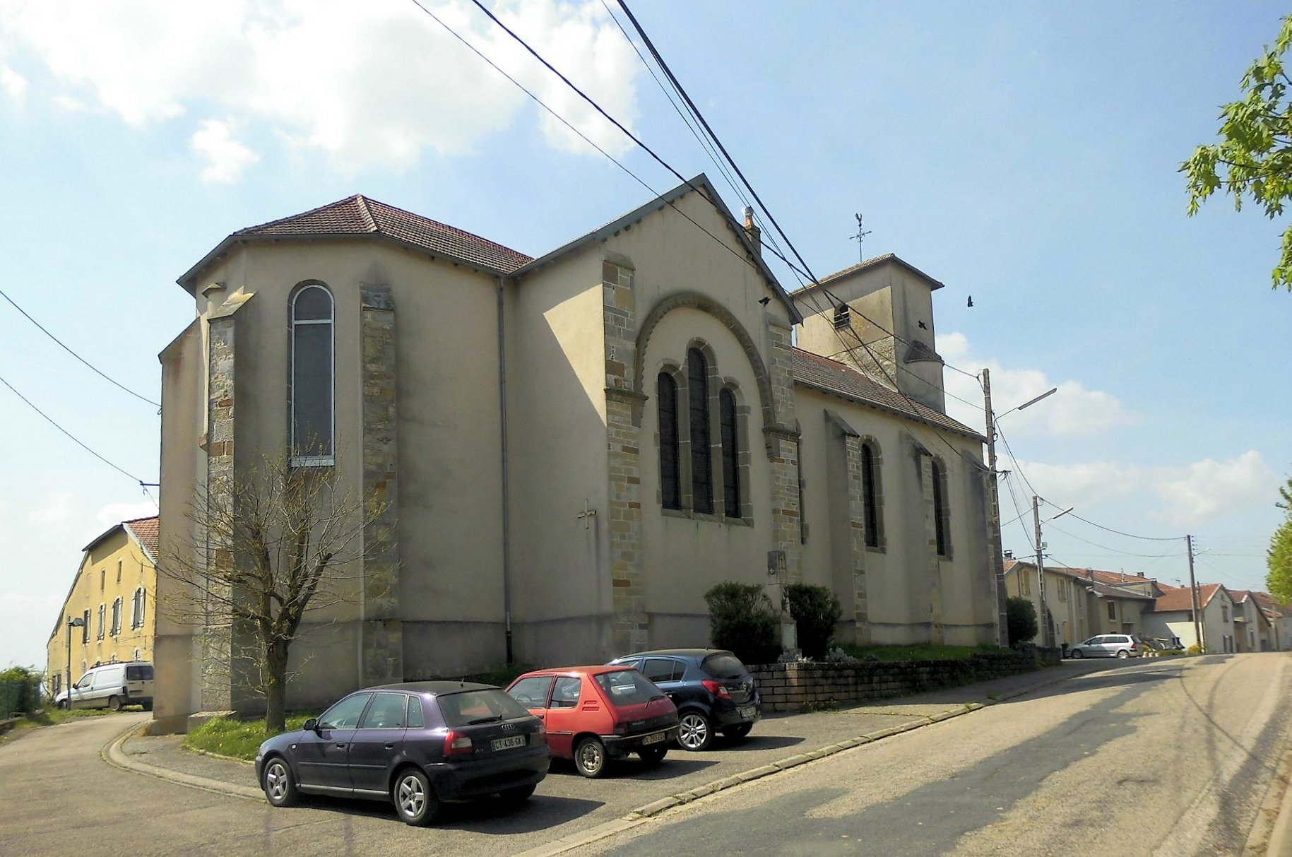 L'église Saint-Pierre et Saint-Paul d'Aboncourt, côté sud-est